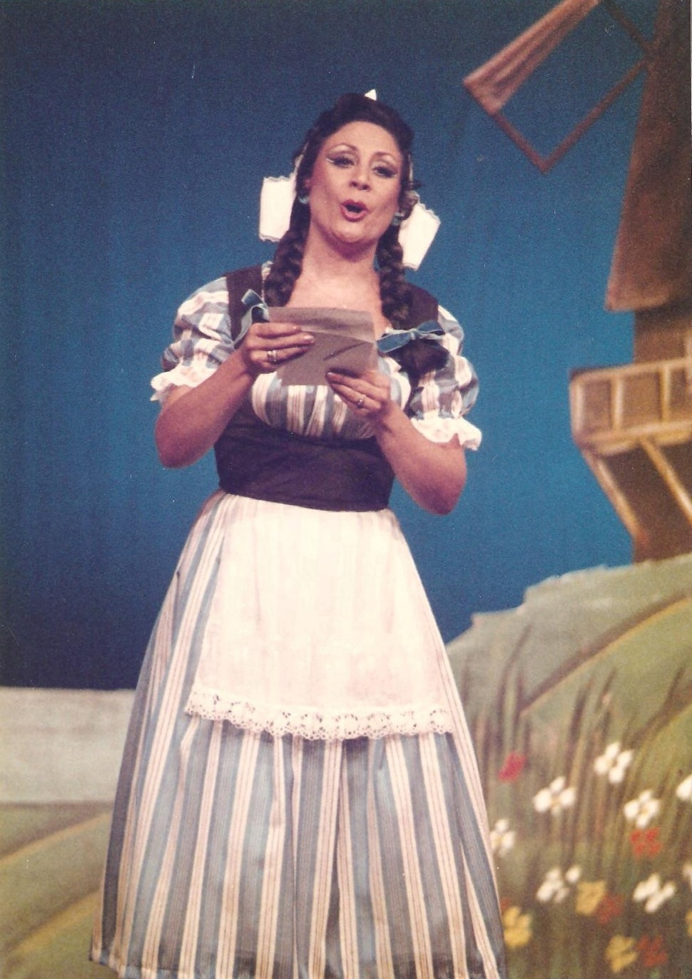 Paloma Mairant como Margarita en la romanza de "La carta", de la zarzuela "Molinos de viento". Centro Cultural de la Villa de Madrid (hoy Teatro Fernán Gómez), 22 de julio de 1986.